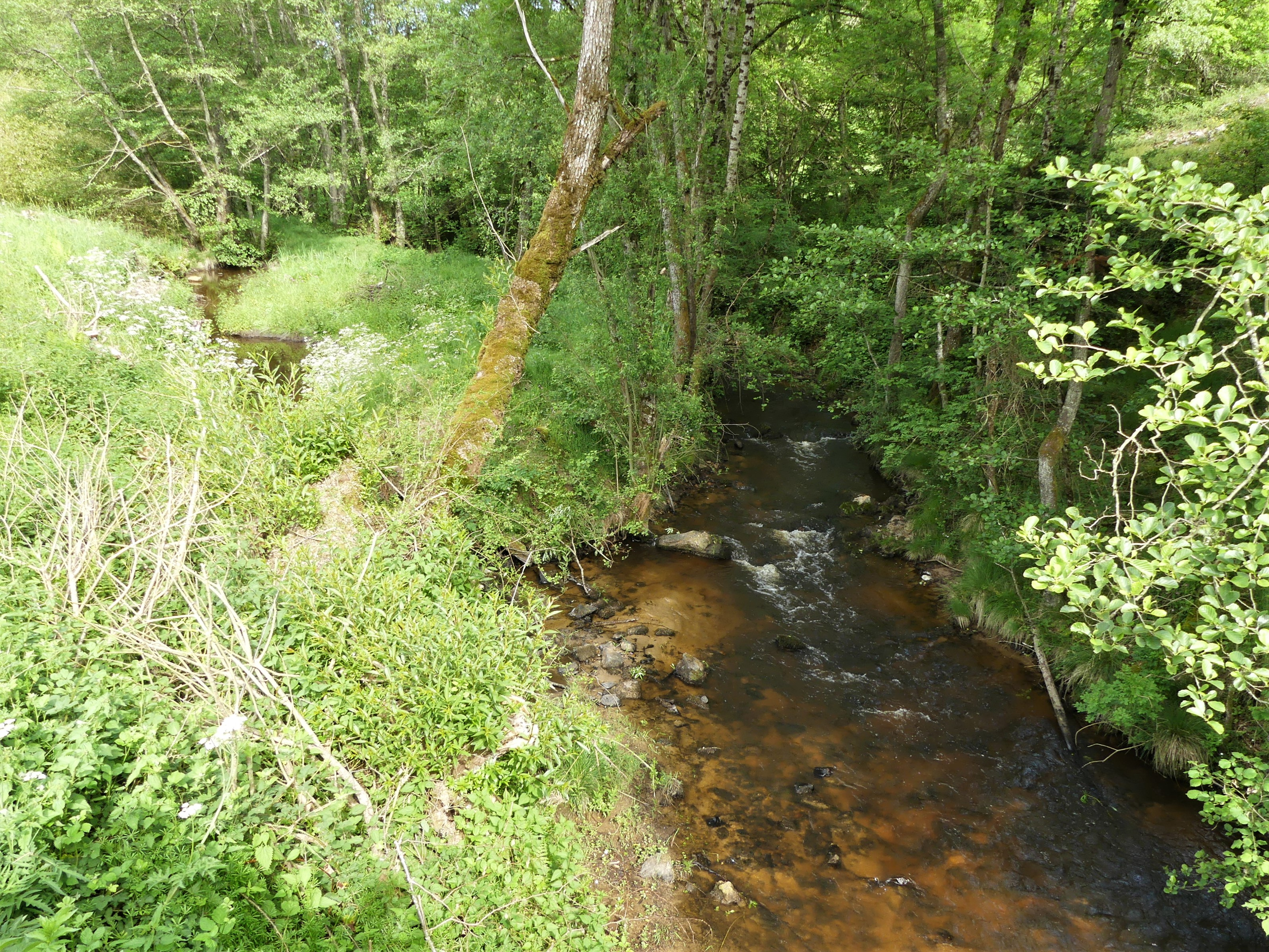 La Beauze au sud du lieu-dit Mergoux, Saint-Marc-à-Frongier, Creuse, France. Vue prise en direction de l'amont.